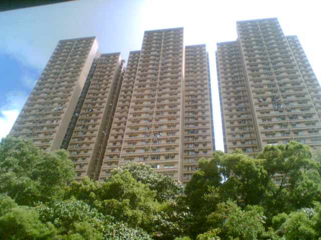 Yue On Court, Ap Lei Chau, Hong Kong